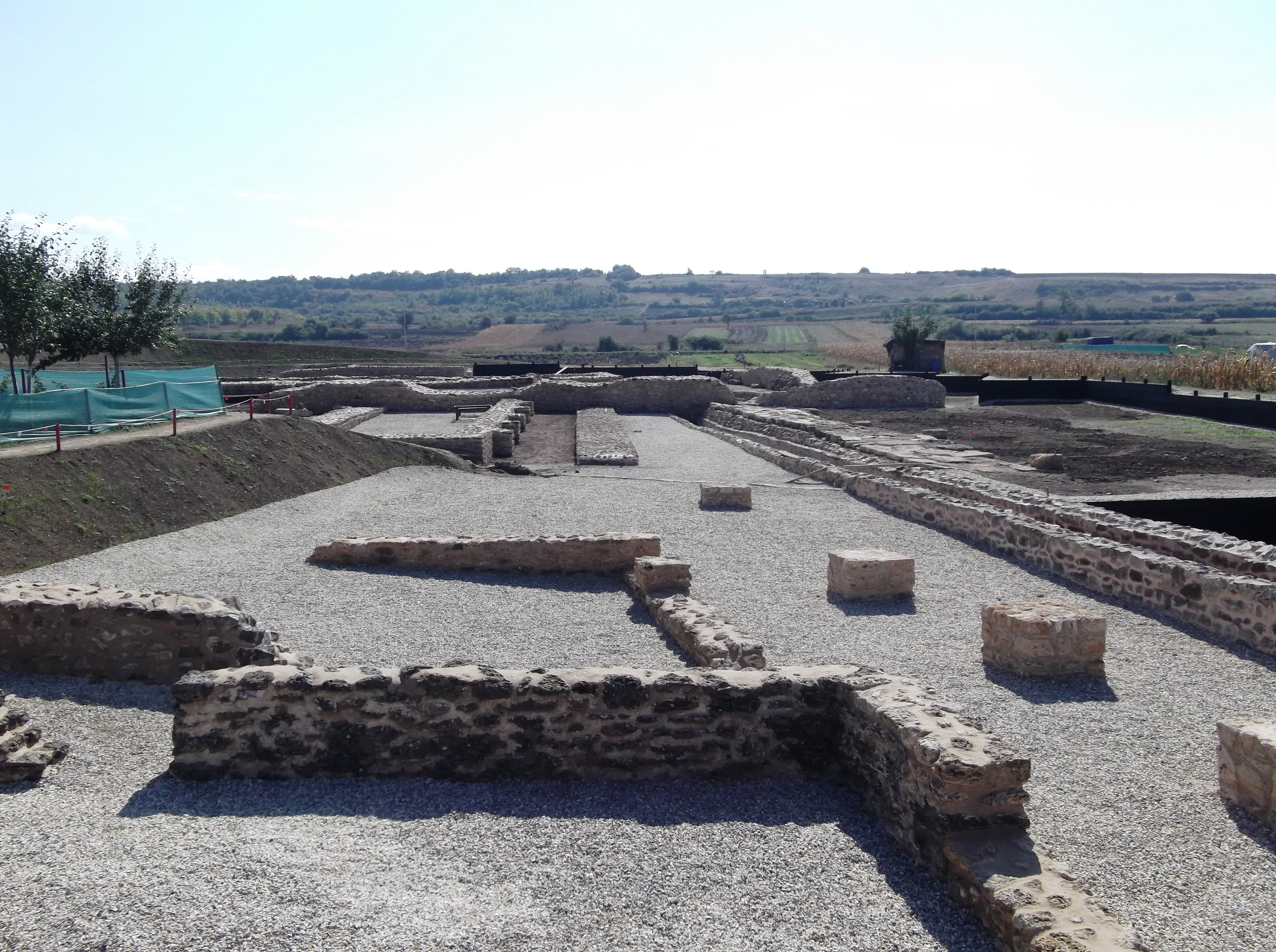 ULPIANA-lokaliteti arkeologjik